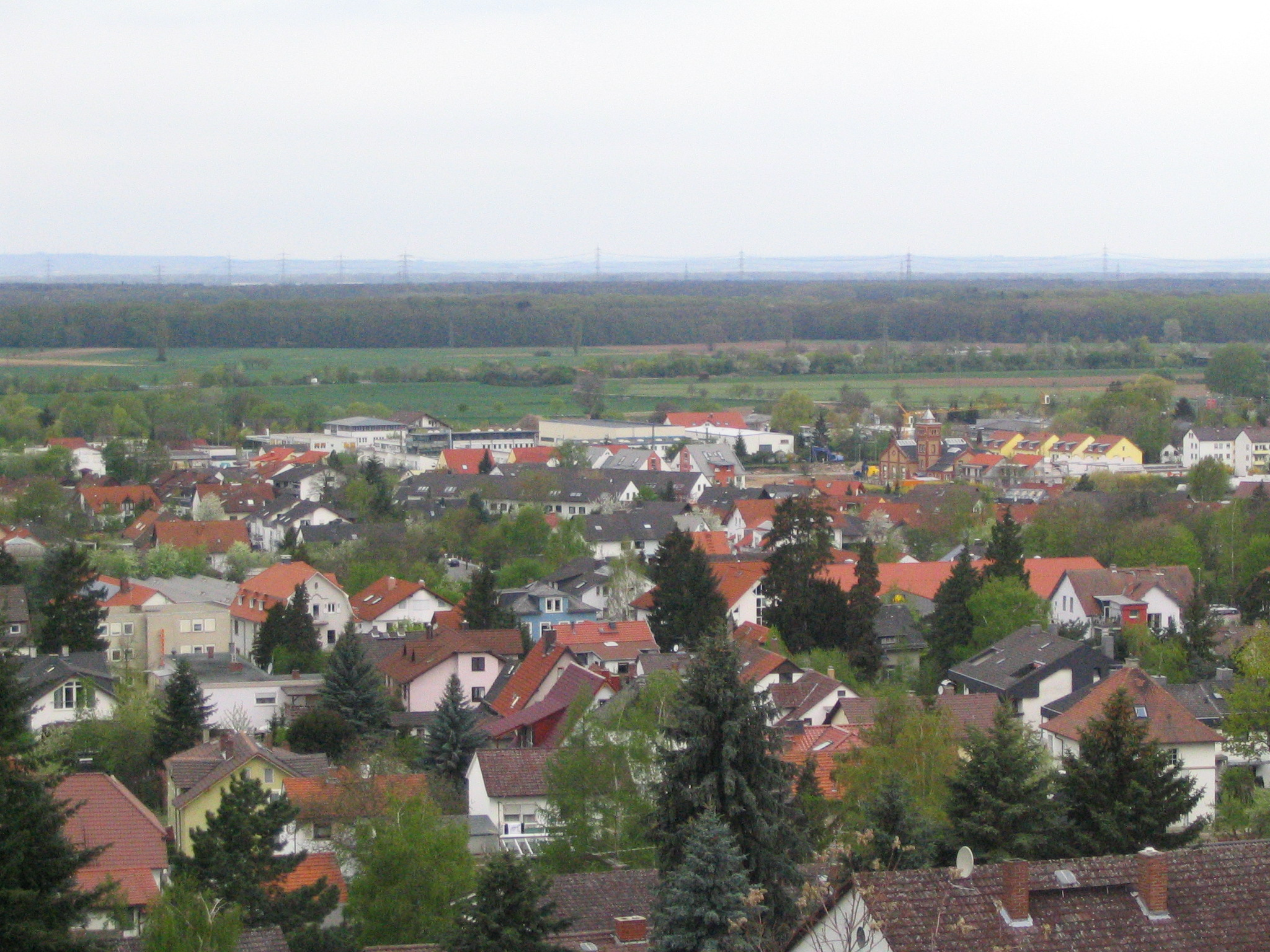 Bensheim-Auerbach von Osten gesehen mit altem Elektrizitätswerk